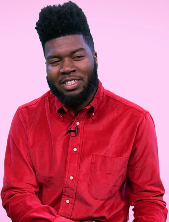 Khalid en entrevista con MTV